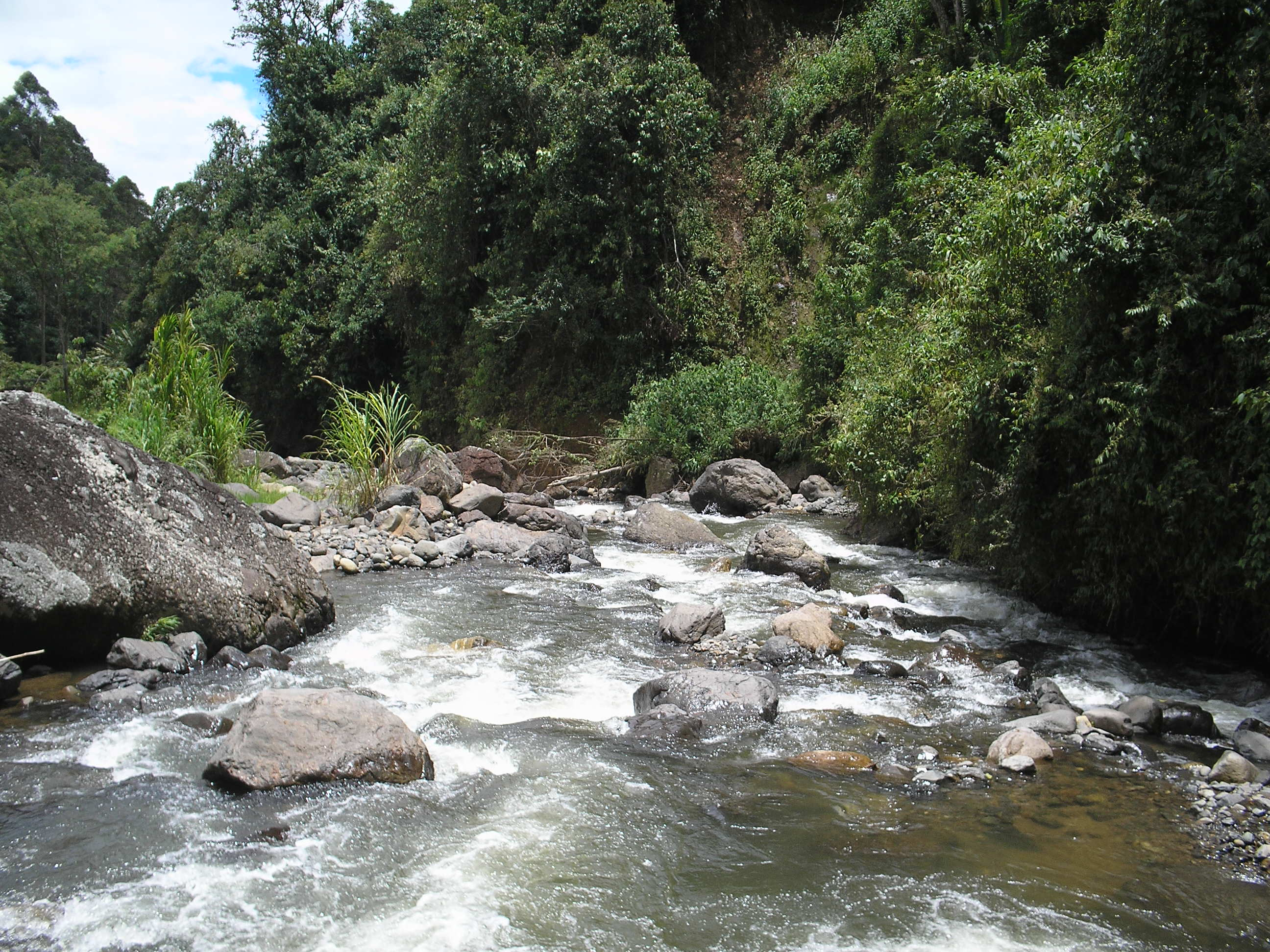 Quebrada La Herrera en el municipio de Jardín, Antioquia. La quebrada La Herrera, al unirse a la quebreda la Bonita, forma el charco corazón, donde pueden bañarse las personas.